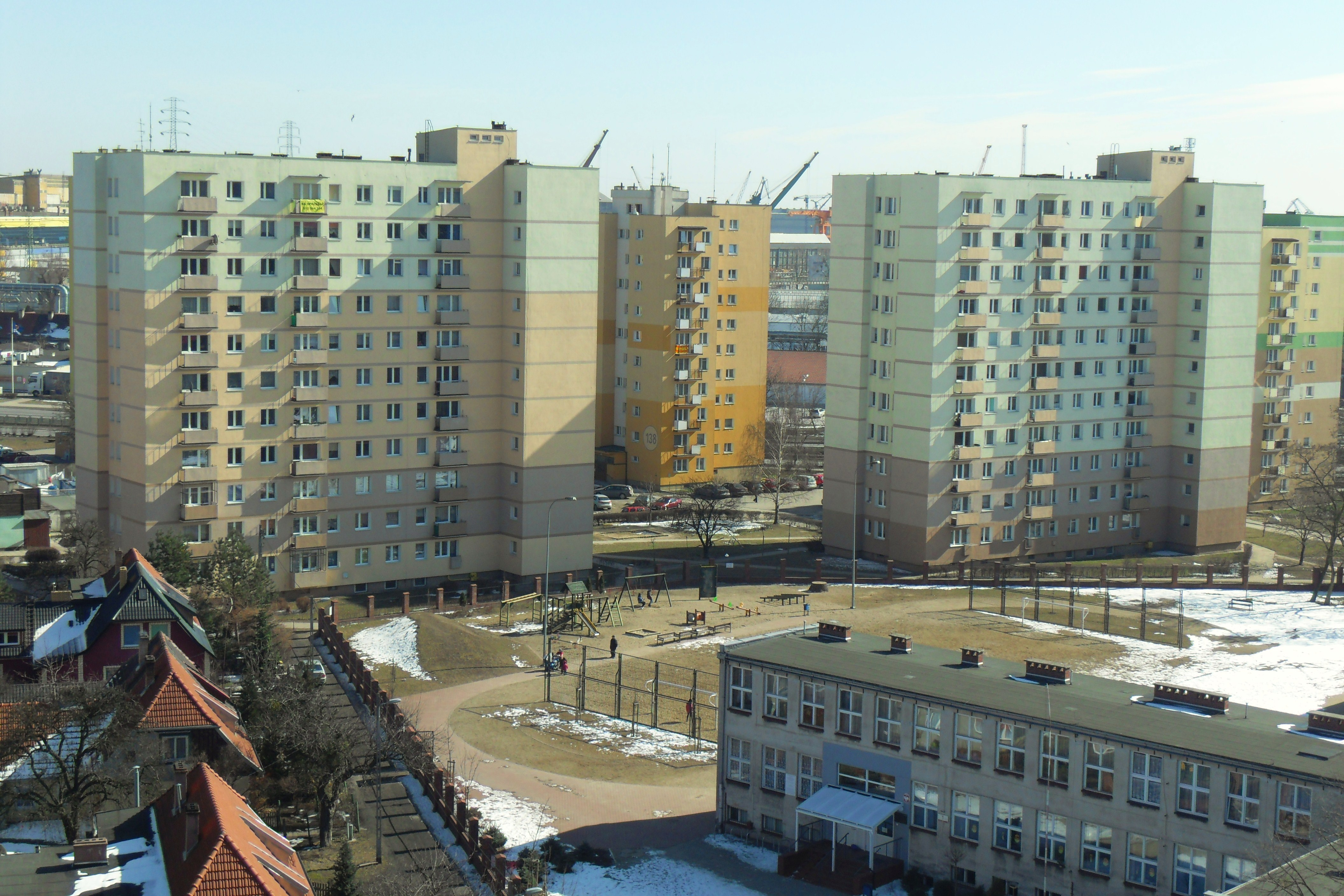 Gdańsk Młyniska, ul. Marynarki Polskiej 136A, 138 i 138A.